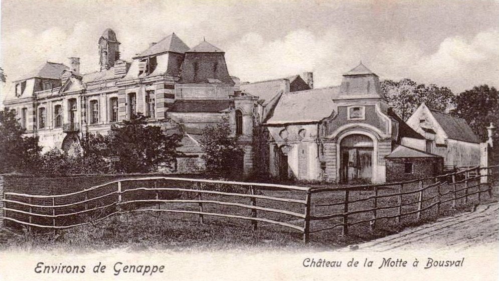 Le Château de "La Motte" à Noirhat, quartier de Bousval (Genappe) au début du 20ème siècle. (Actuellement Drève des Châtaigners) pillé et réduit en ruine durant la première guerre mondiale.